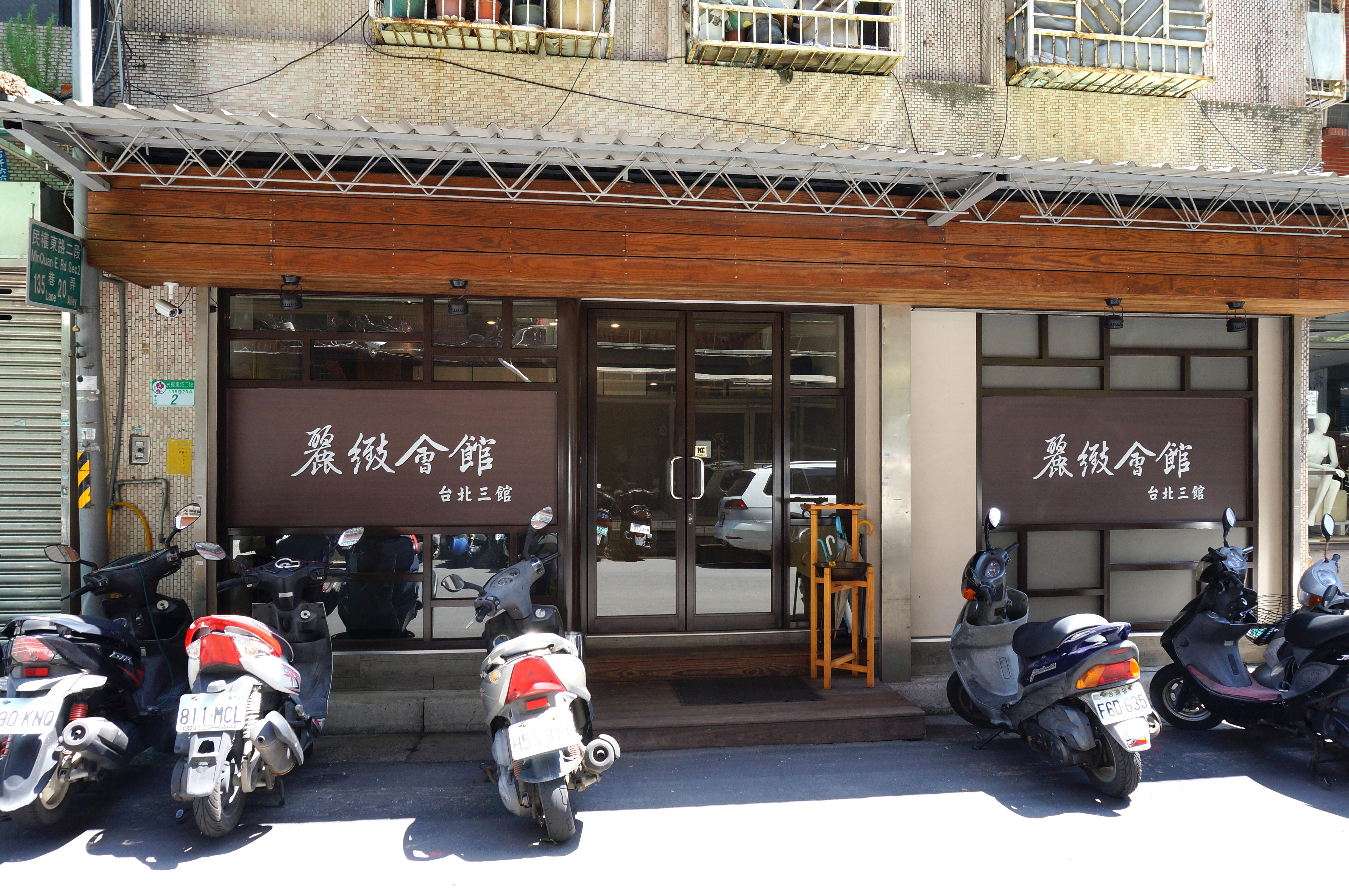 麗緻會館台北三館，地址：臺北市中山區民權東路二段135巷20弄2號1樓。賀一航靈堂設於此。